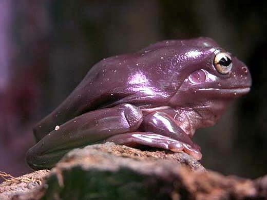 Selbst fotografiert. Aufgenommen mit einer Nikon Coolpix 5700 im Kölner Zoo. Fotograf/Quelle: Wilfried Berns / Motiv: Vermutlich Korallenfinger (Litoria caerulea)